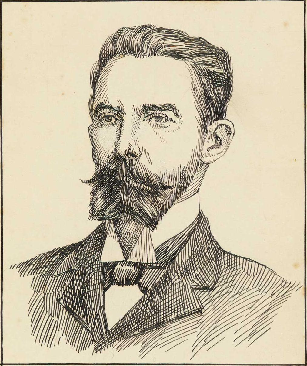 Raymundo Corrêa